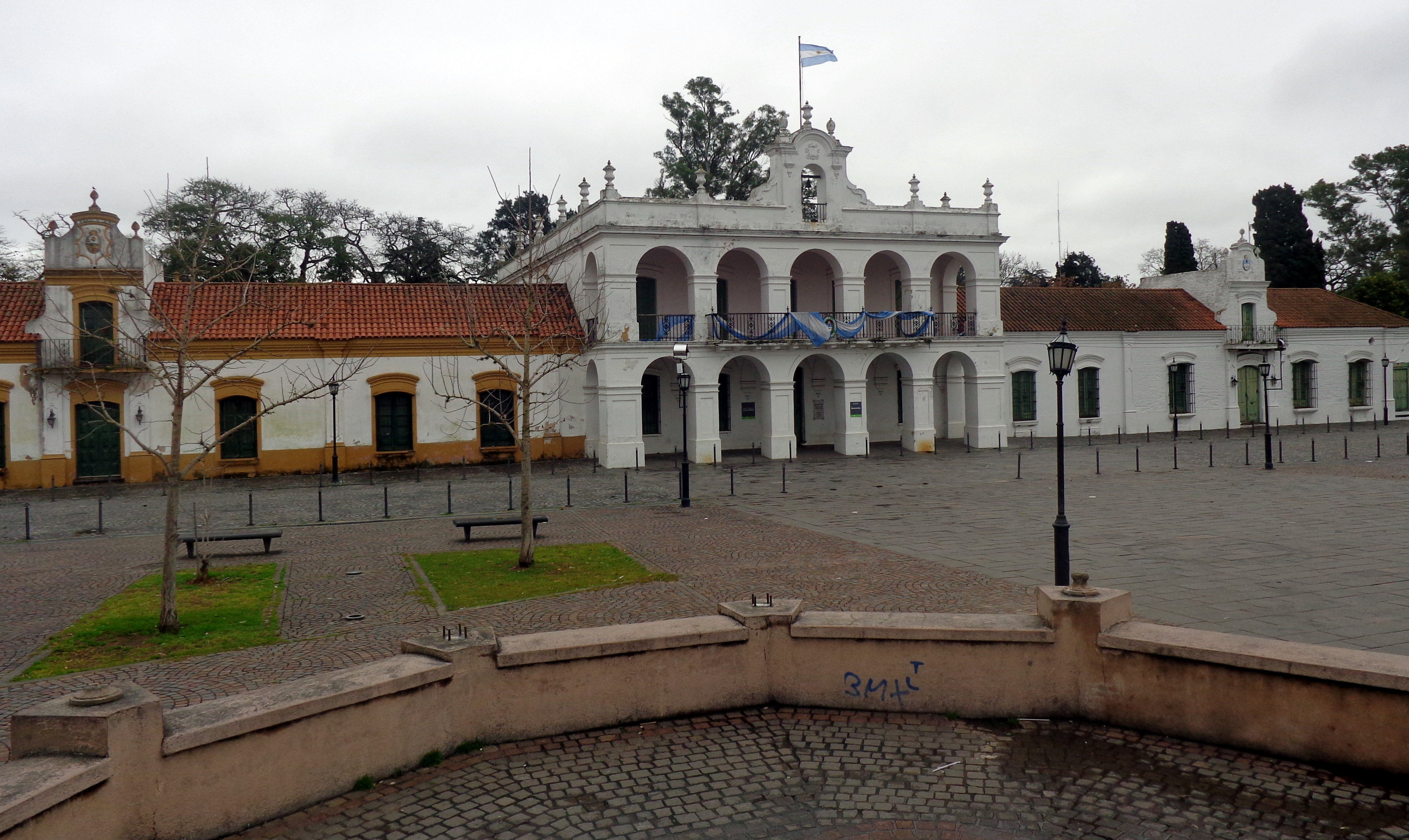 Cabildo de Luján, en el Complejo Museográfico Provincial Enrique Udaondo. Plaza Belgrano. Provincia de Buenos Aires, Argentina.